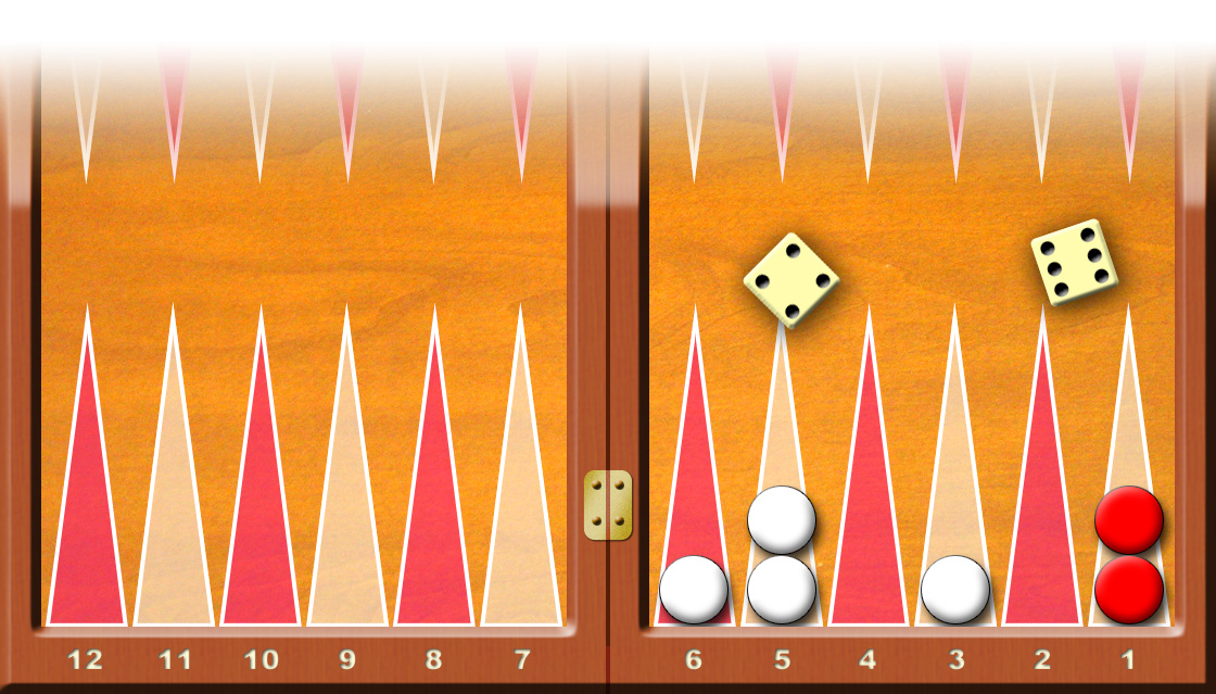 Backgammon--Dadi_6e4-Altra mossa obbligata nel togliere una sola pedina Francesco De Lorenzo (fr.dl CHIOCCIOLA tiscali.it) è l'autore di questa immagine e l'ha rilasciata sotto licenza GFDL